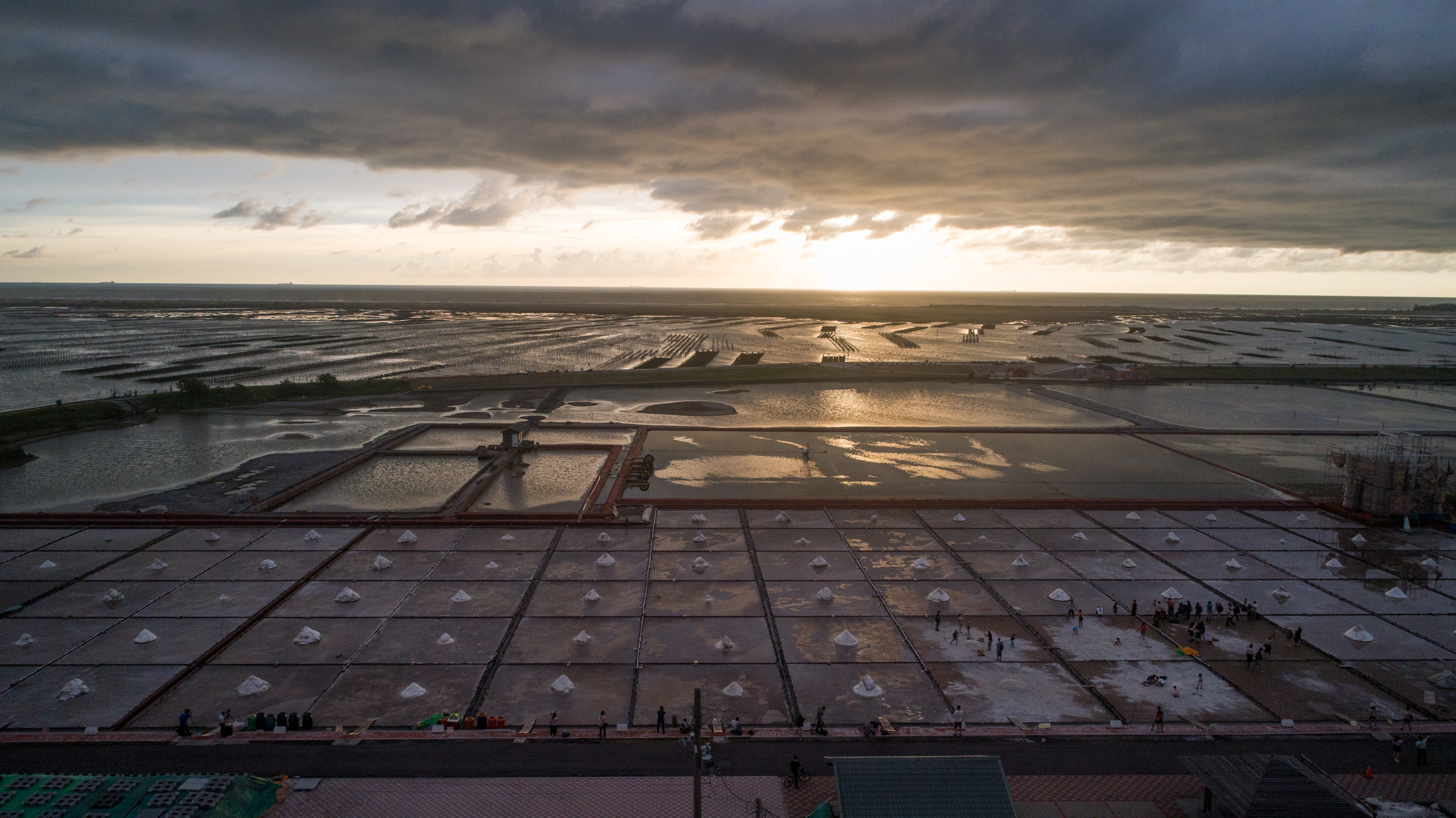 傍晚的井仔腳瓦盤鹽田空拍實景